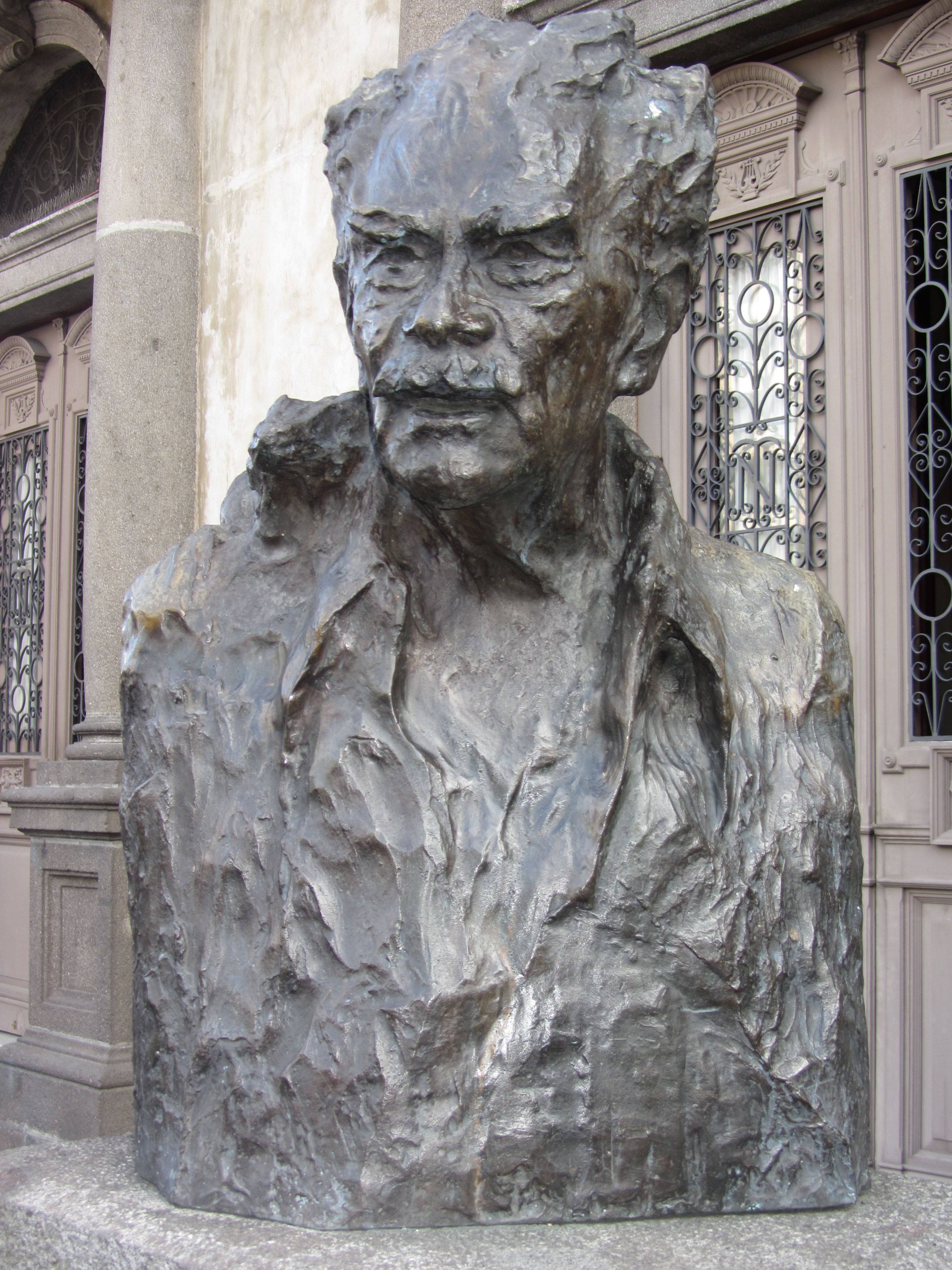 Busto del escritor constarricense Joaquín Gutiérrez en el Paseo de los Artistas del jardín del Teatro Nacional, en San José